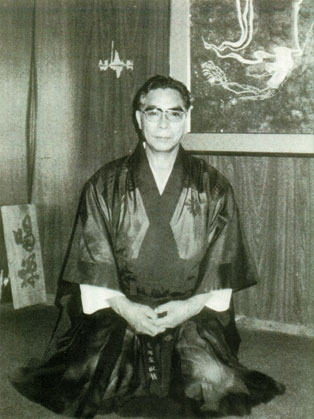 写真により説明をわかりやすくした